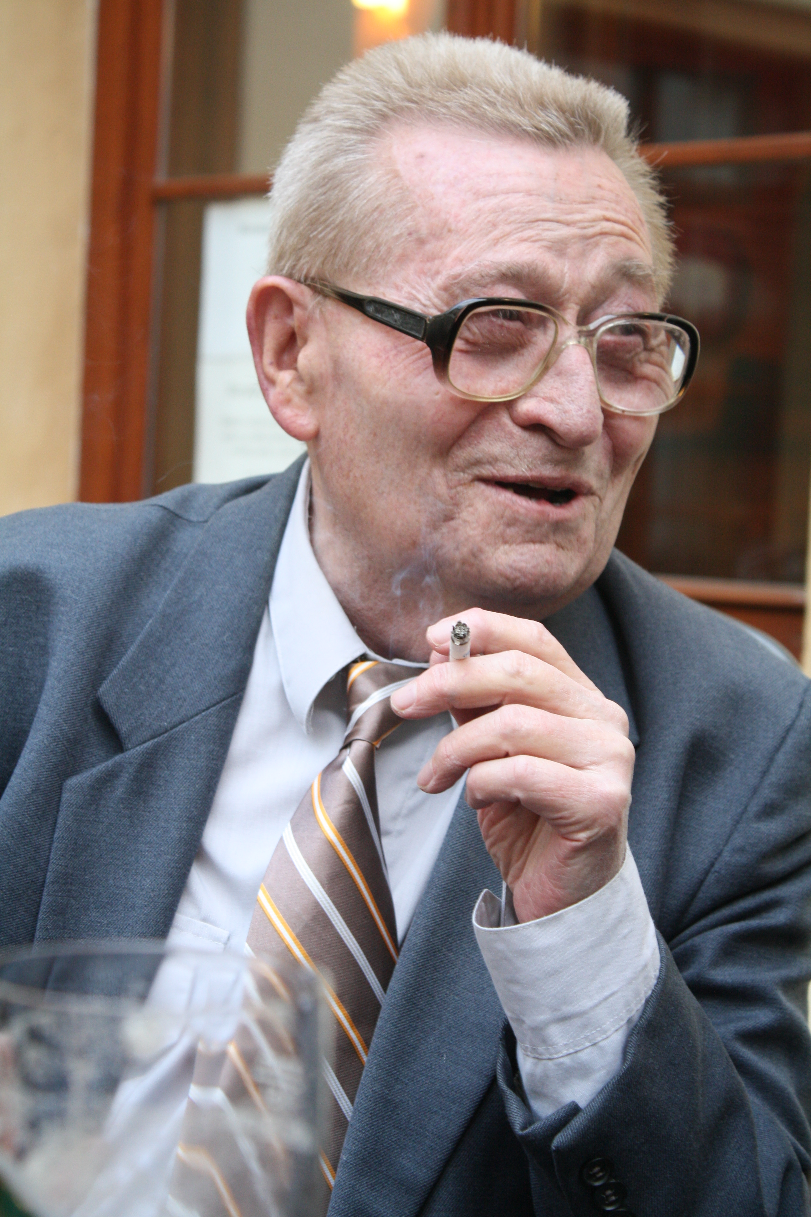 27.duben 2010, restaurace U Goliáše, autor fotky Mgr. Petr Vejbor